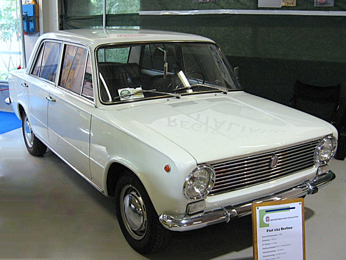 Subject:Fiat 124 berlina